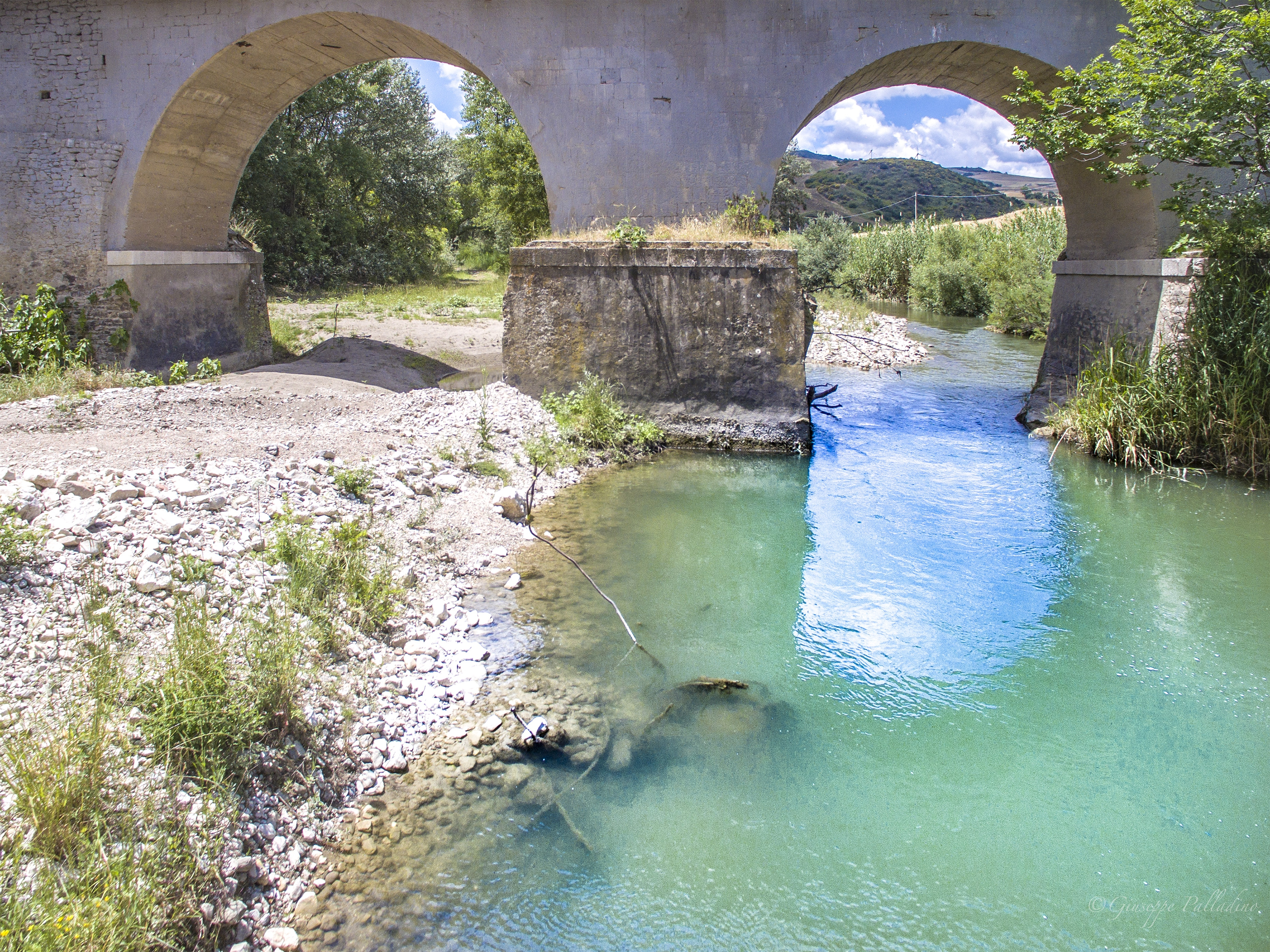 Ponte Romano sito a Rocchetta Sant'Antonio